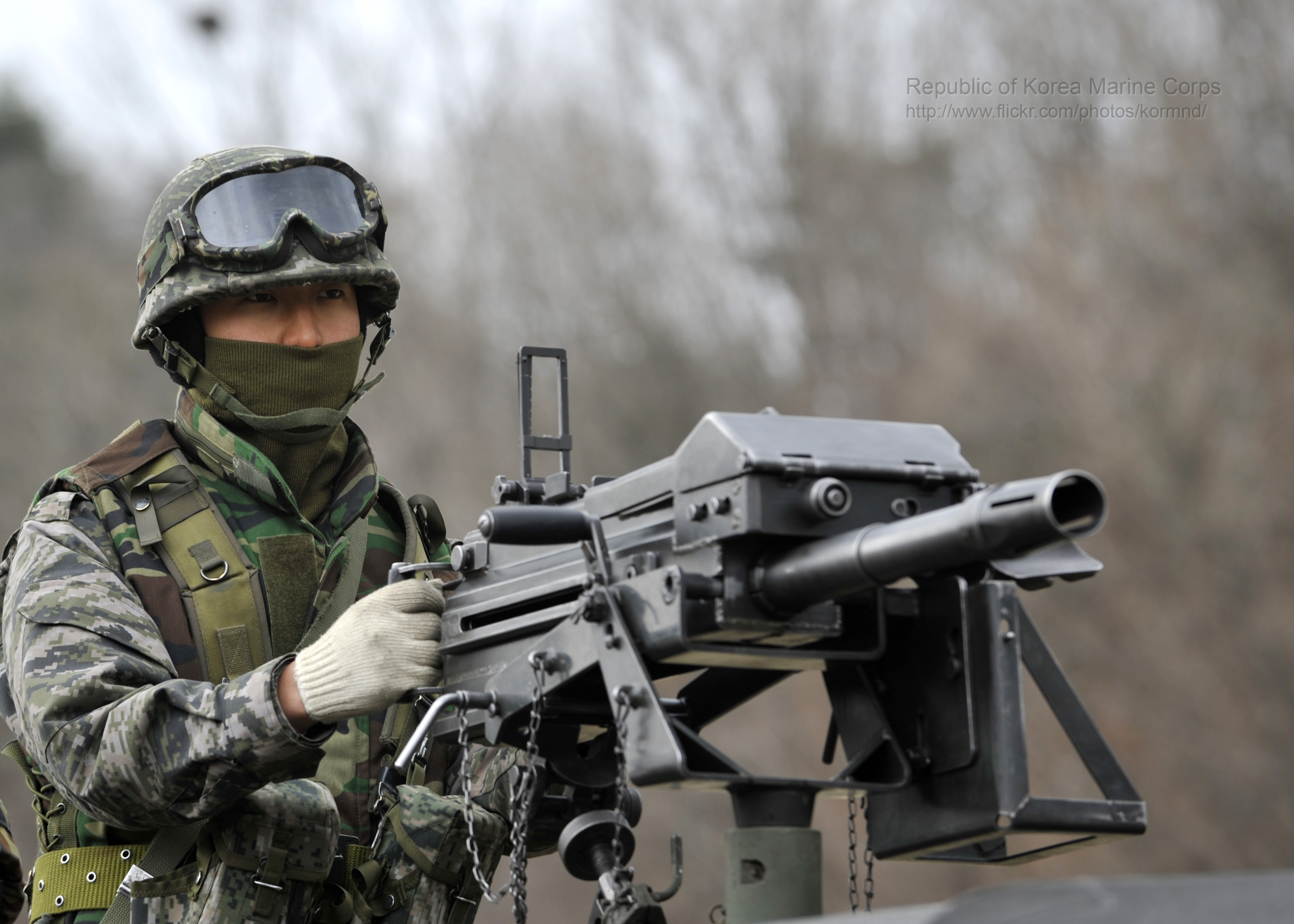 '13 한미연합 KMEP에 참가한 해병대 장병들이 K-4고속유탄기관총 사격을 위해 준비 하고 있다. 촬영 - 중사 조정민